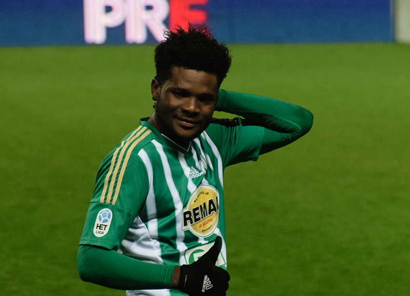 Benjamin Tetteh